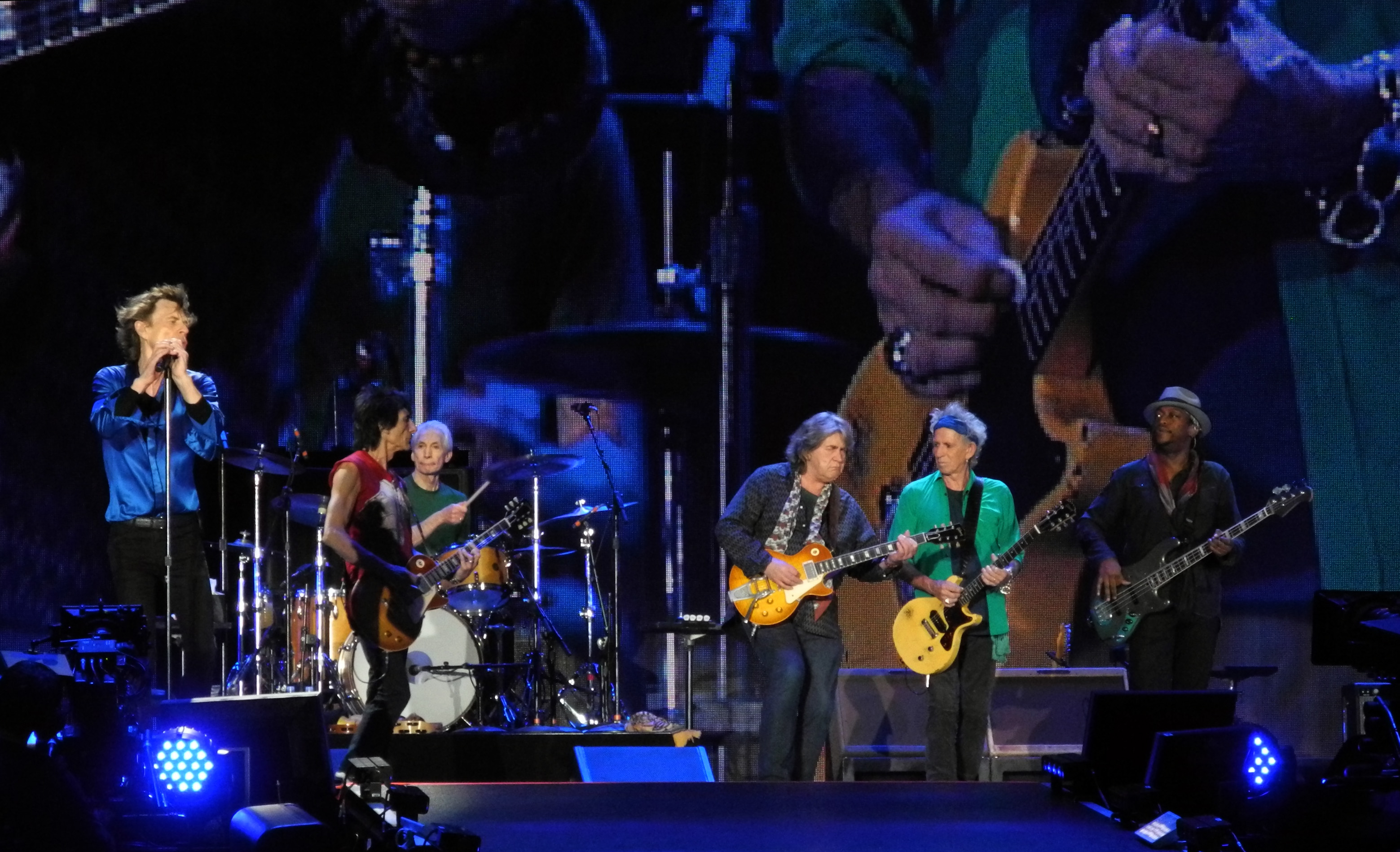 Concerto dei Rolling Stones ad Hyde Park per il tour '50 and counting...' del 2013